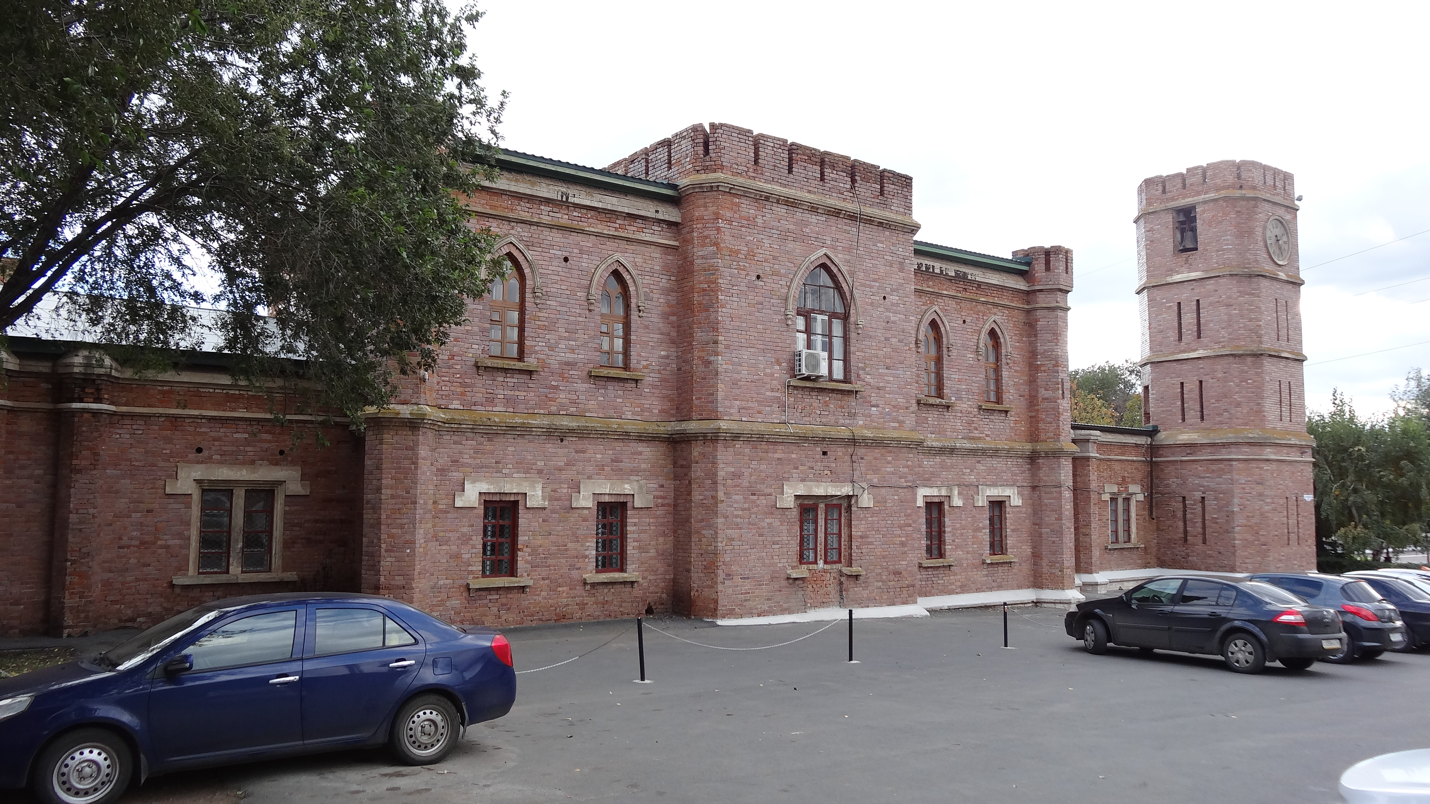 Здание гауптвахты (архив, казна) (Оренбургская область, Оренбург, Набережная улица, 29)